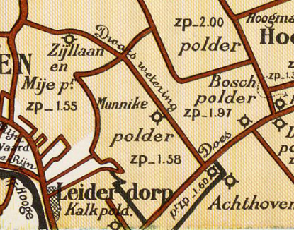 Munnikepolder